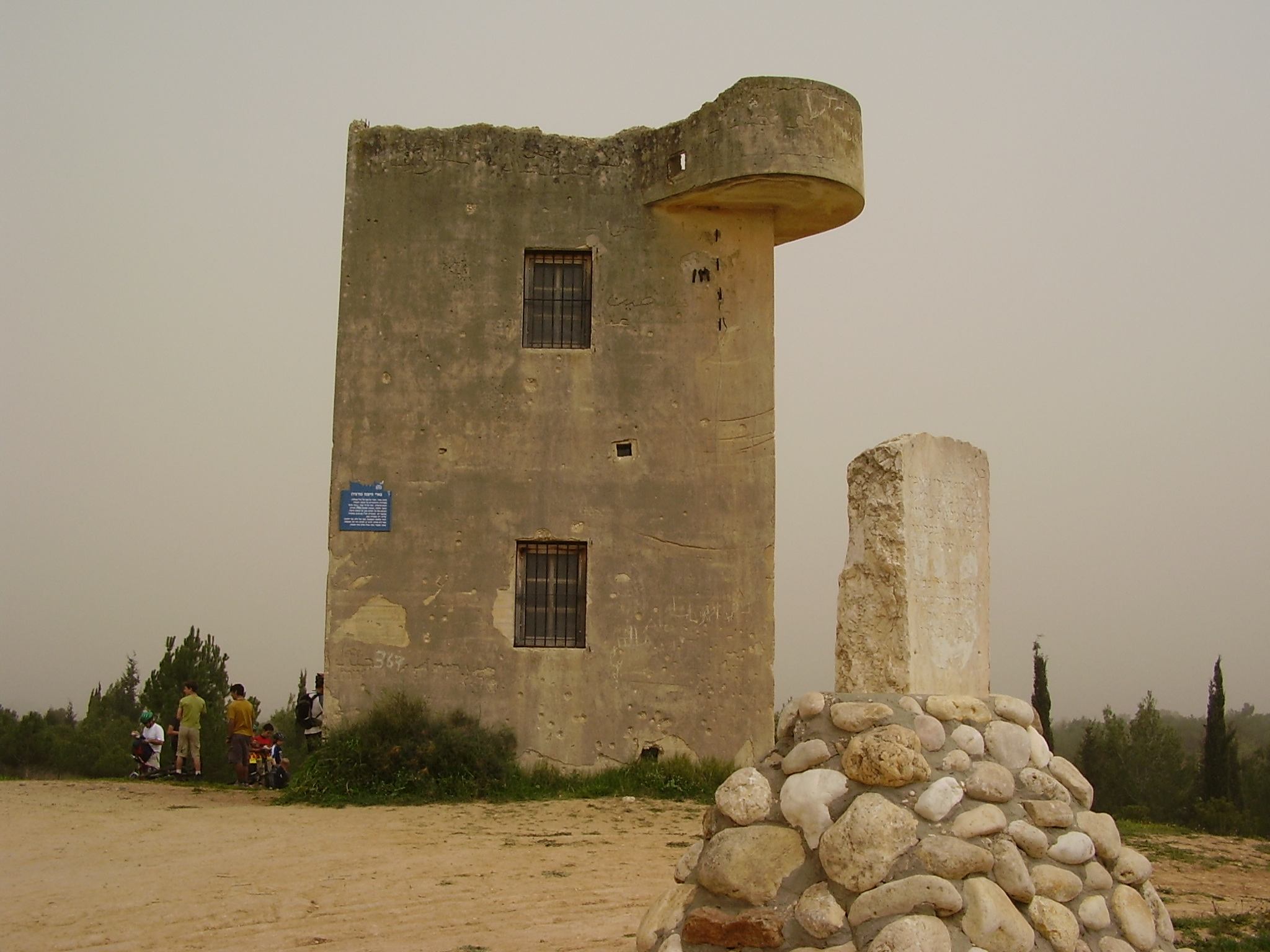 בארי הישנה